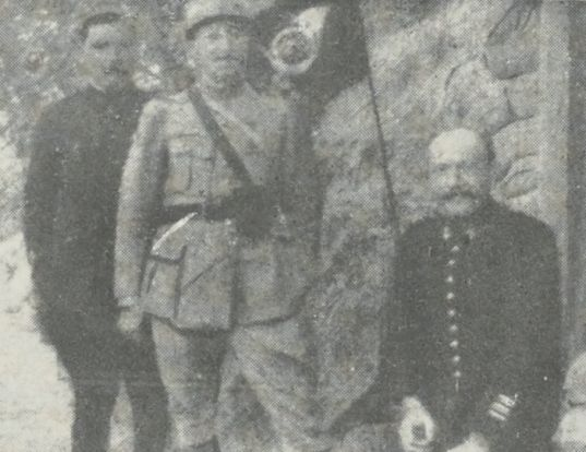 L'E. M. du 12° GROUPE DE CHASSEURS : Colonel [futur général] CABOTTE, lieutenant SEIGNETTE, lieutenant DELARUELLE de l'I.D. 129 en visite.